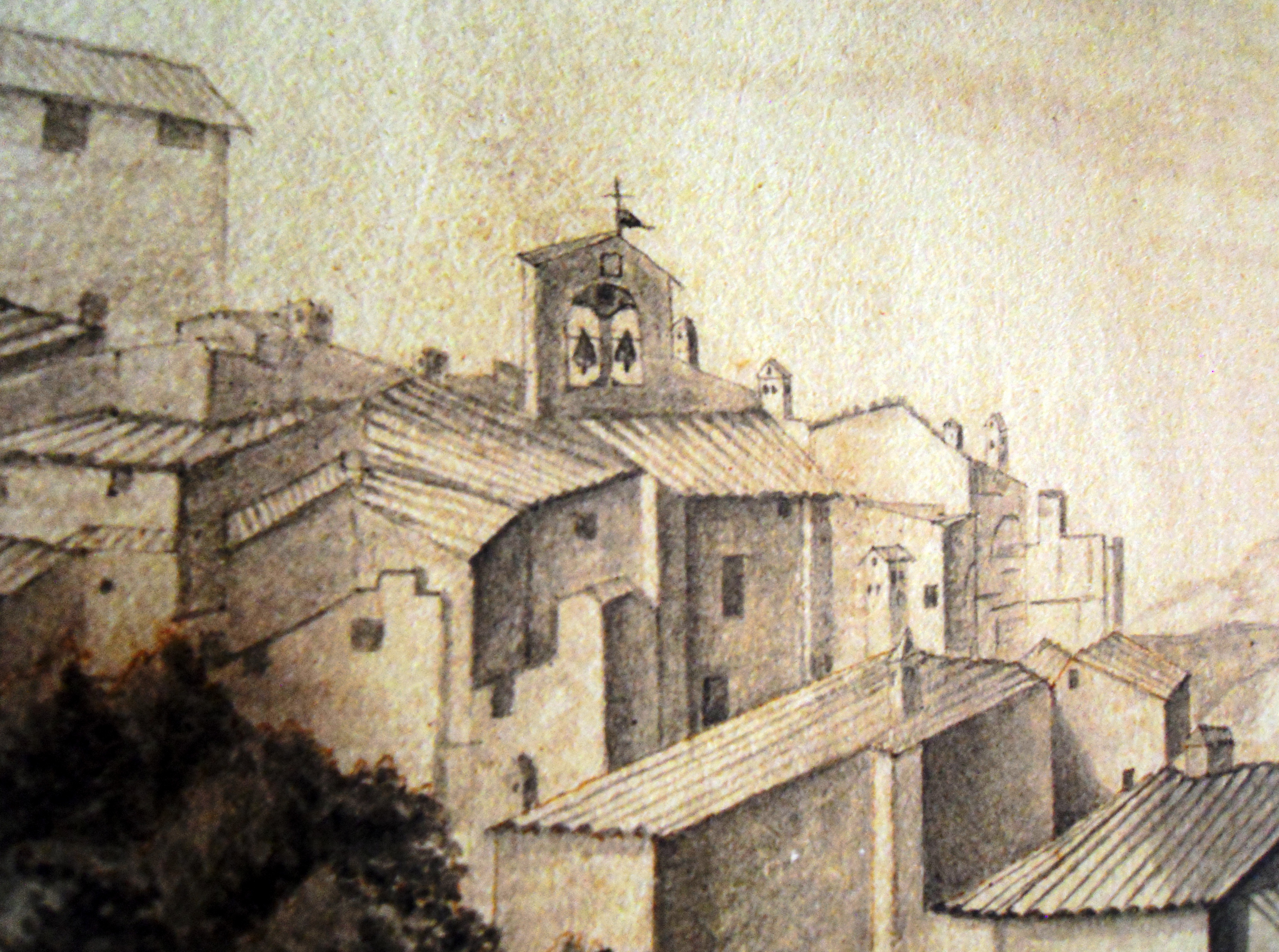 Veduta esterna della Pieve dopo i restauri del 1727 nell'affresco Veduta della Grancia e Castello di Montisi (XVIII secolo)